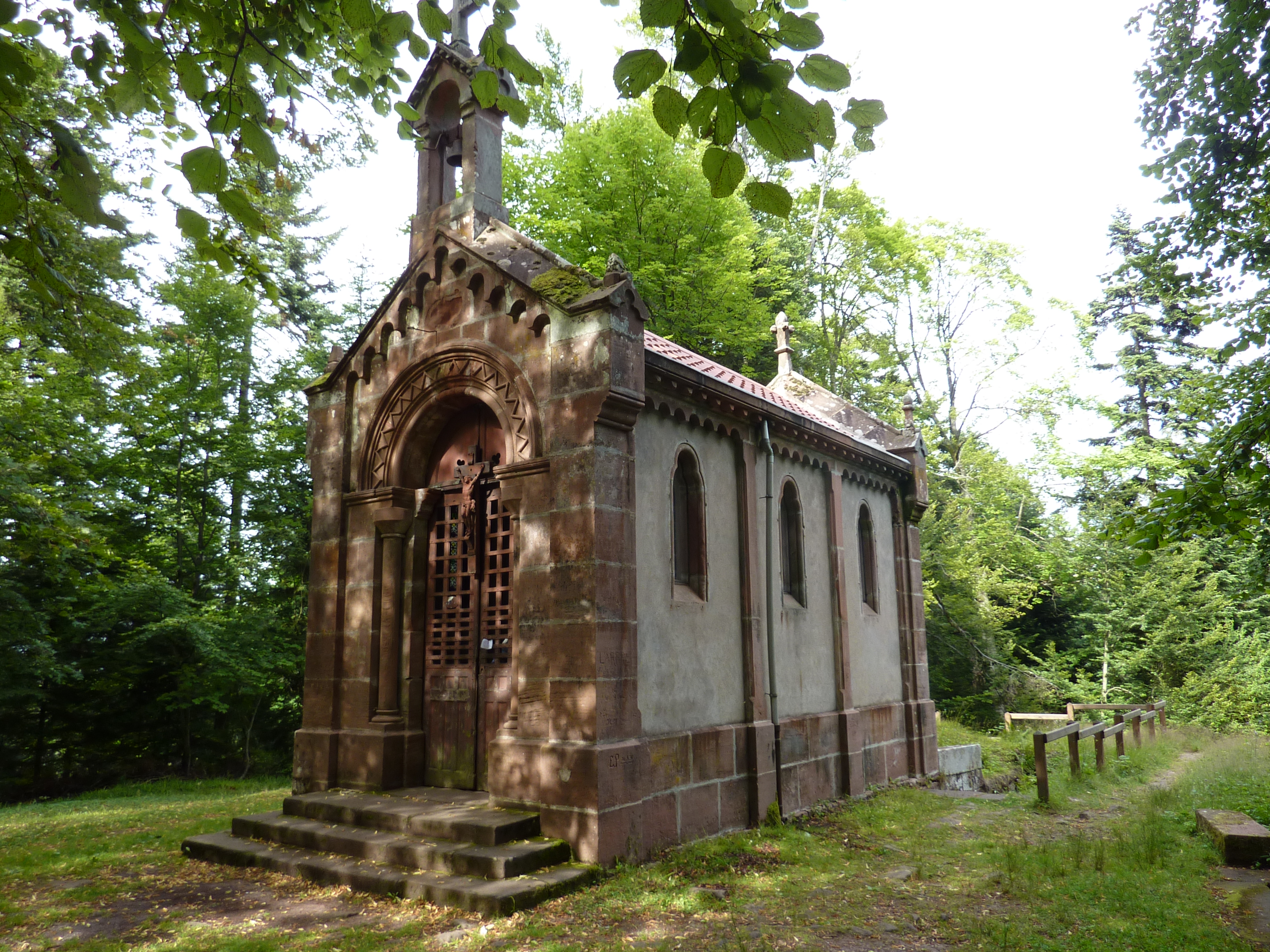 Chapelle Notre-Dame-de-la-Maix à proximité du lac de la Maix, commune de Vexaincourt, France.